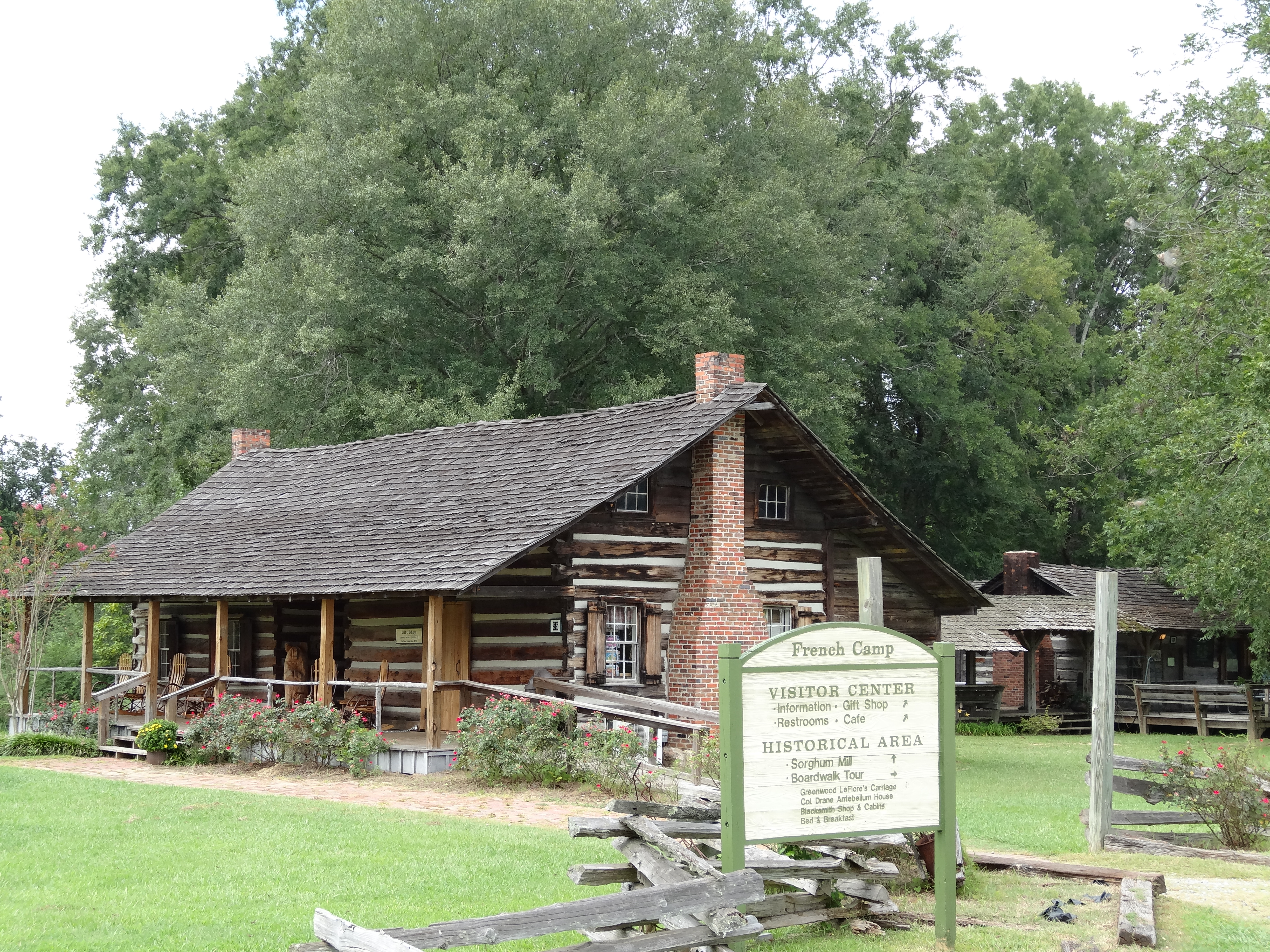 Mississippi Cabin 2